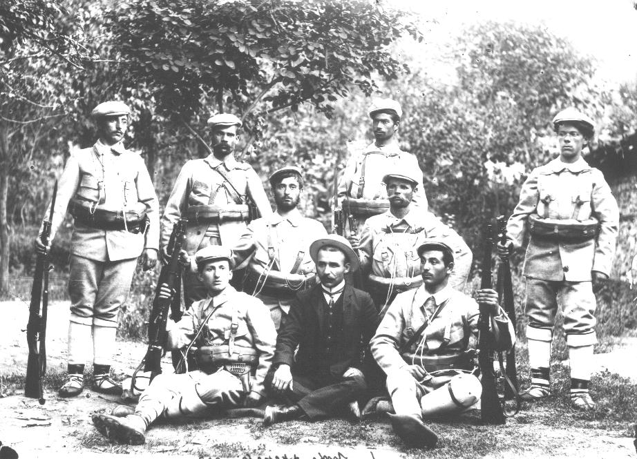 Четата на Лука Джеров.